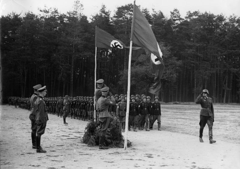 Wolga-Tataren beim Vorbeimarsch Foto H. Philipps Wehrbilderdienst Nr 488/34